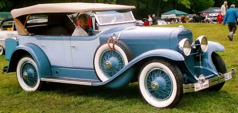 La Salle Series 303 Phaeton 1928